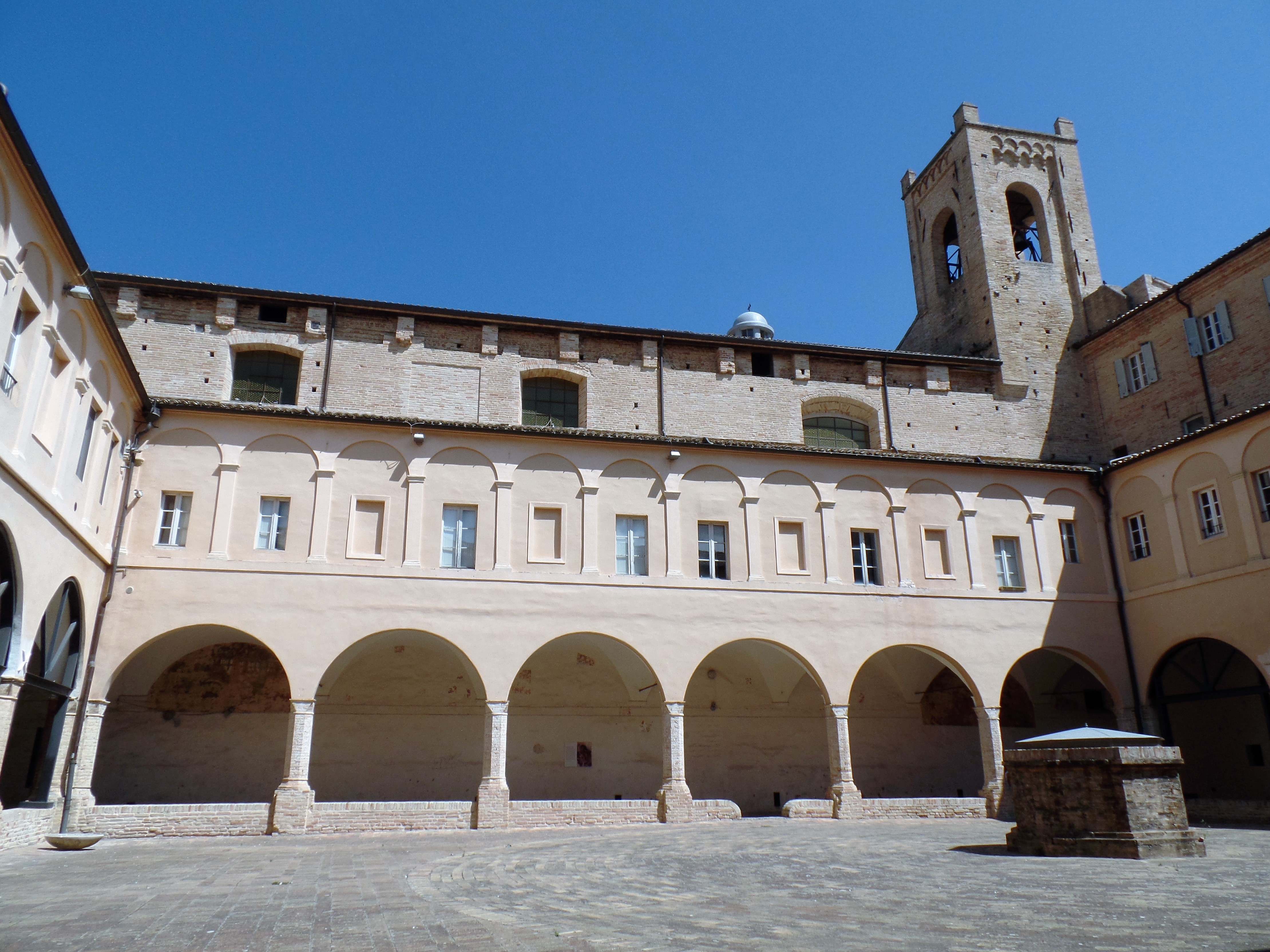 Recanati Convento di S. Agostino chiostro